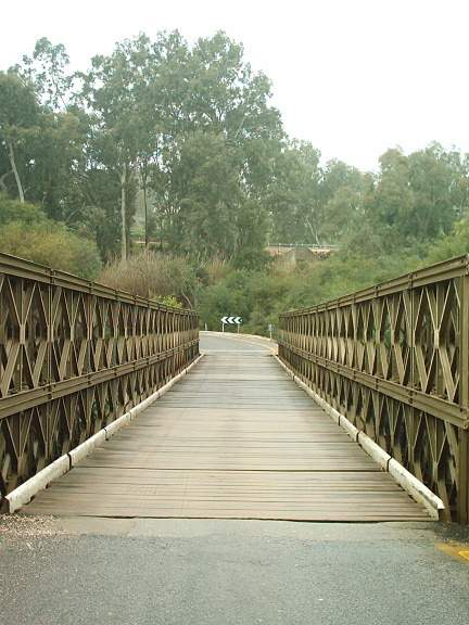 גשר בנות יעקב. 3.1.2003